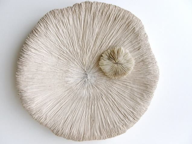 Lidia Boševski: "Morski žal", keramika, 2010.